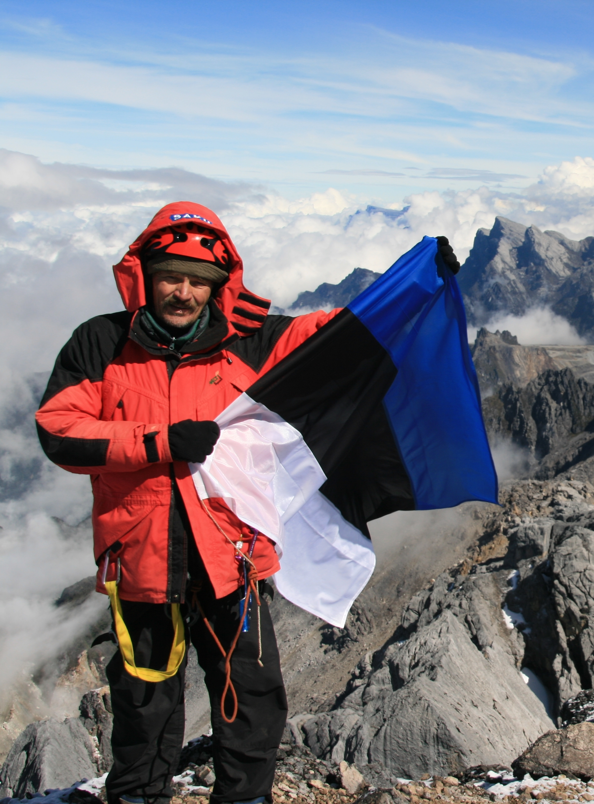 Tõivo Sarmet Carstensz Pyramid`i tipus 25. juulil 2008